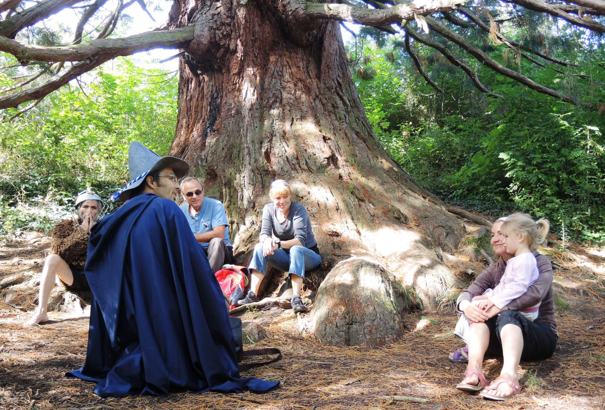 Vanosc sequoia